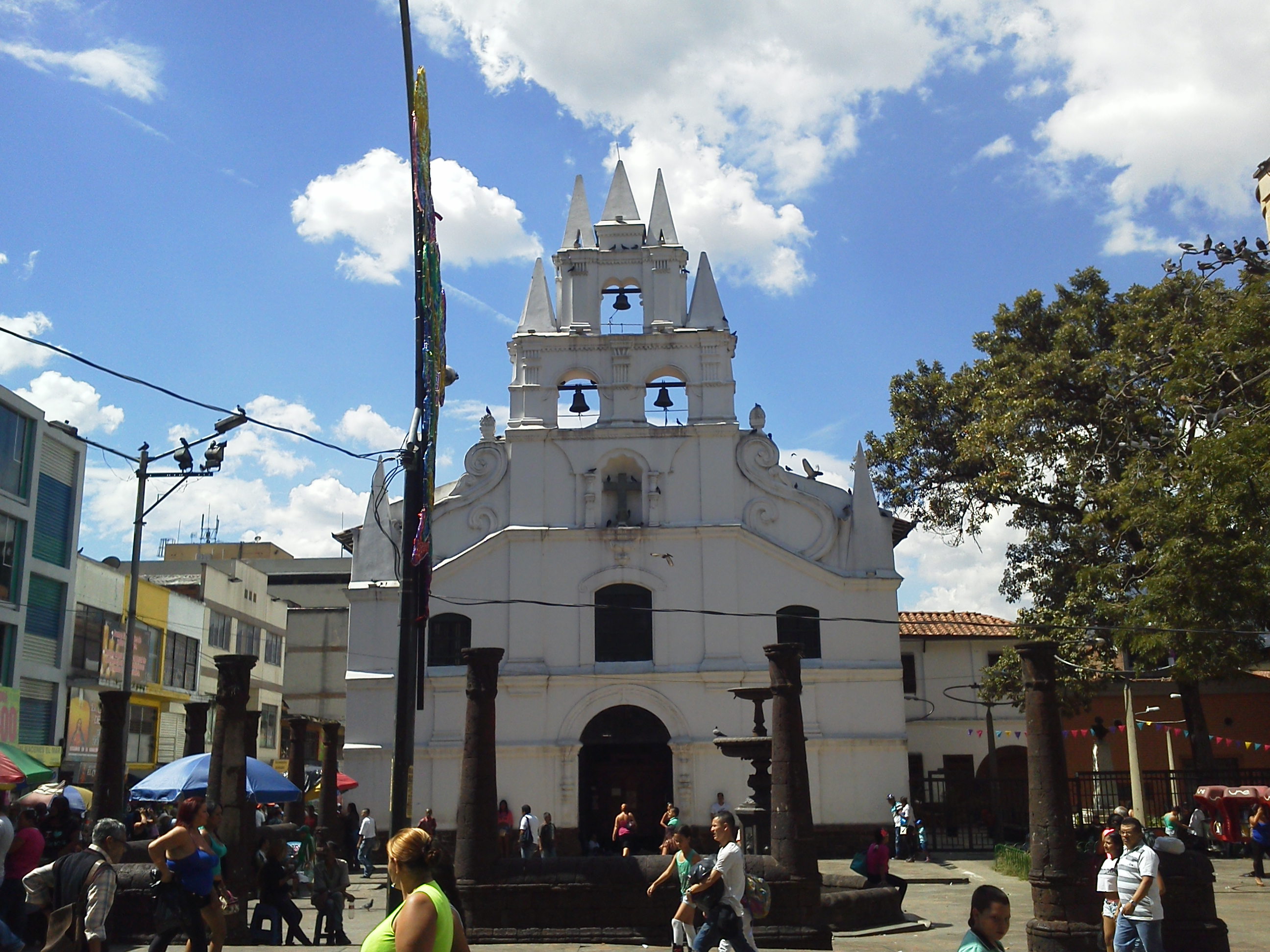 Esta fotografía fue tomada en el municipio colombiano con código 05001.